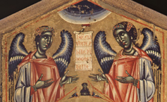 Maestro del san francesco Bardi, Cartiglio nella cuspide della tavola di san Francesco